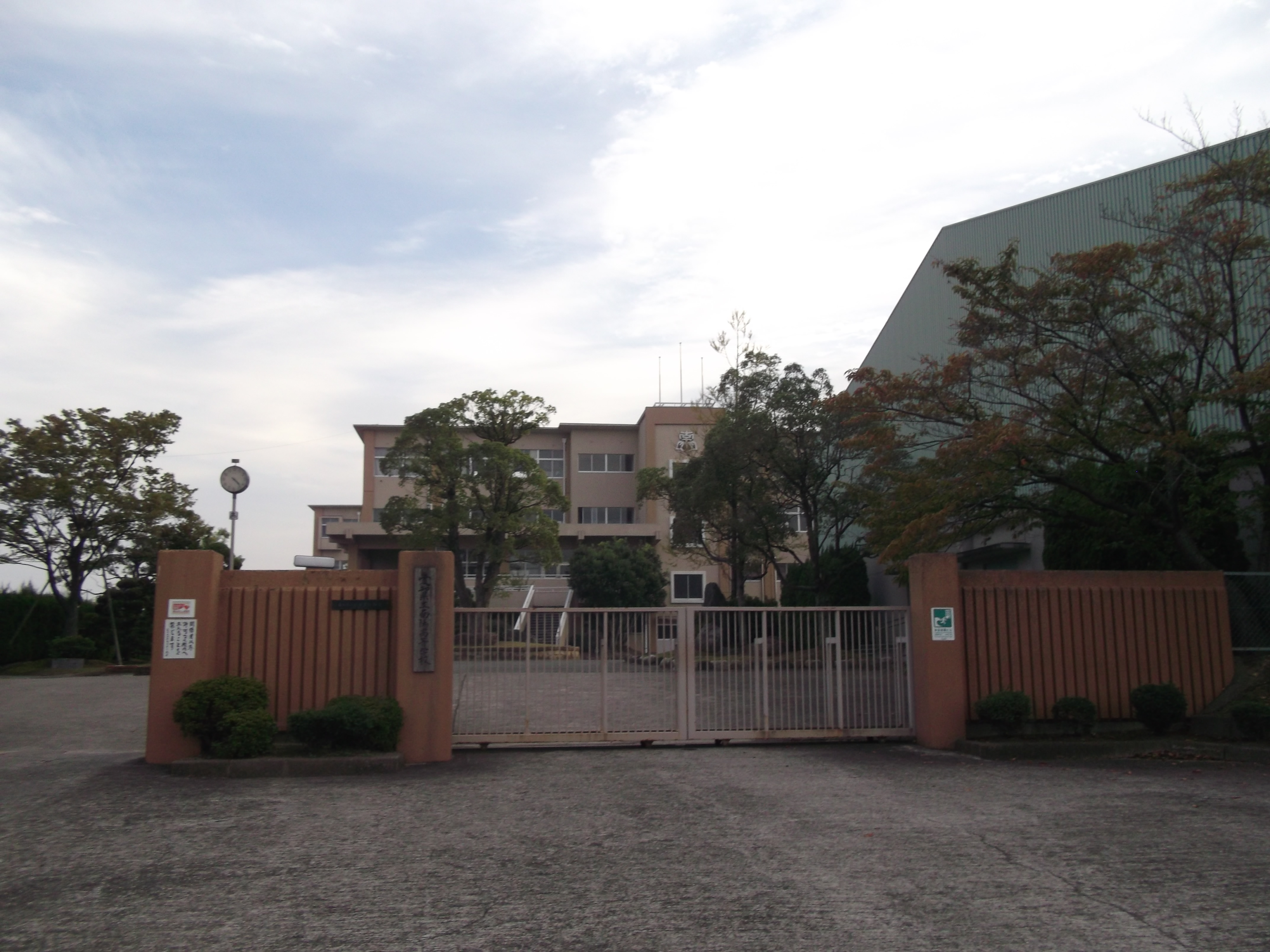 名古屋市港区大西の愛知県立南陽高等学校を北側公道より撮影